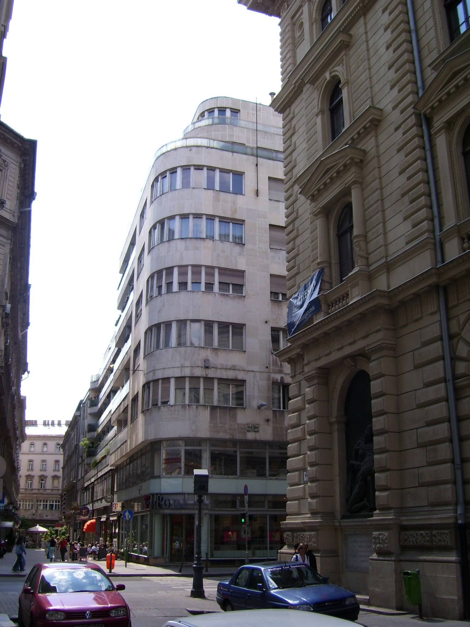 Lakóház Budapest,V.Párisi utca 6 - Petőfi S.utca 12